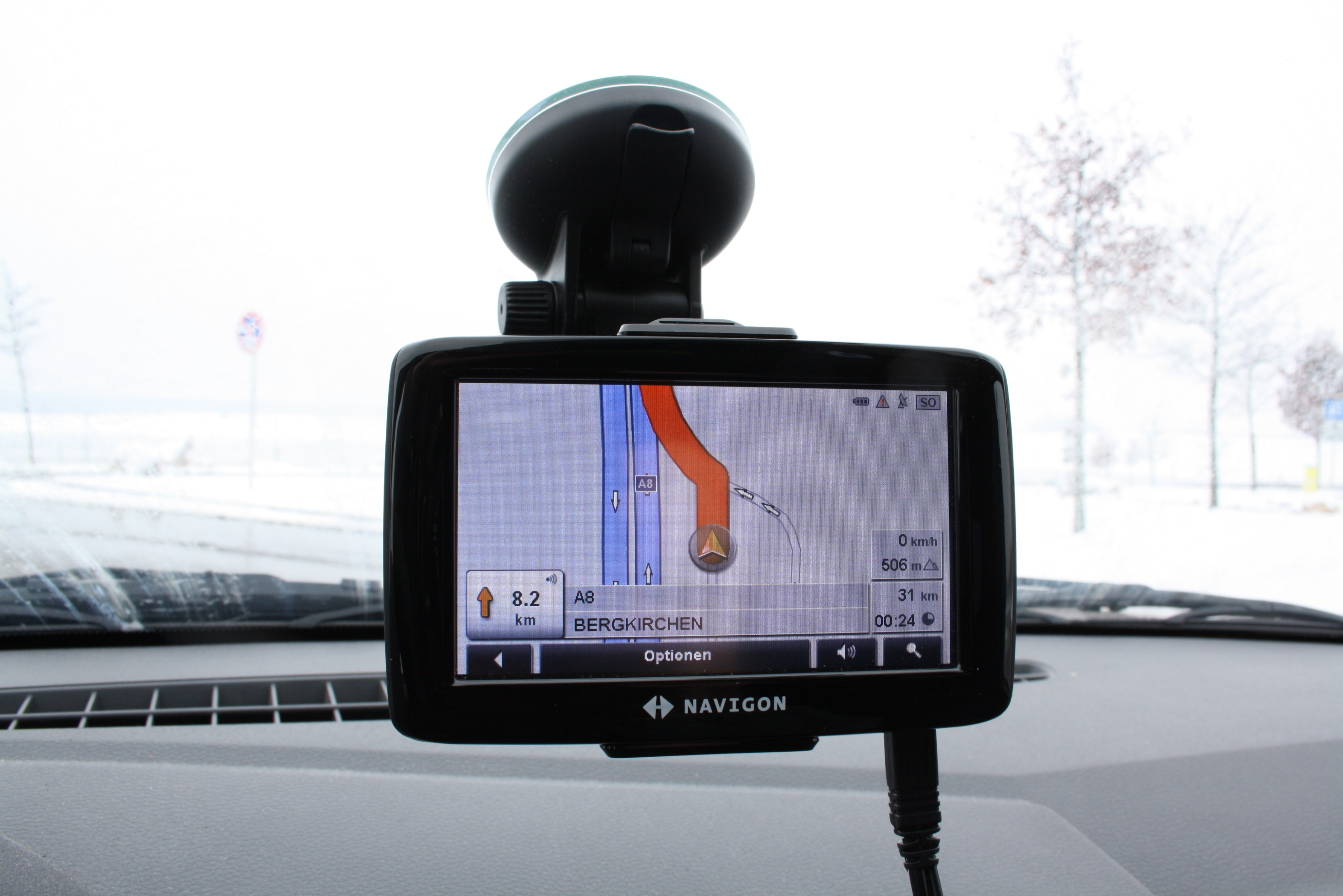 Mobiles Navigationsgerät der Firma Navigon mit Saugnapfhalterung an Windschutzscheibe angebracht.